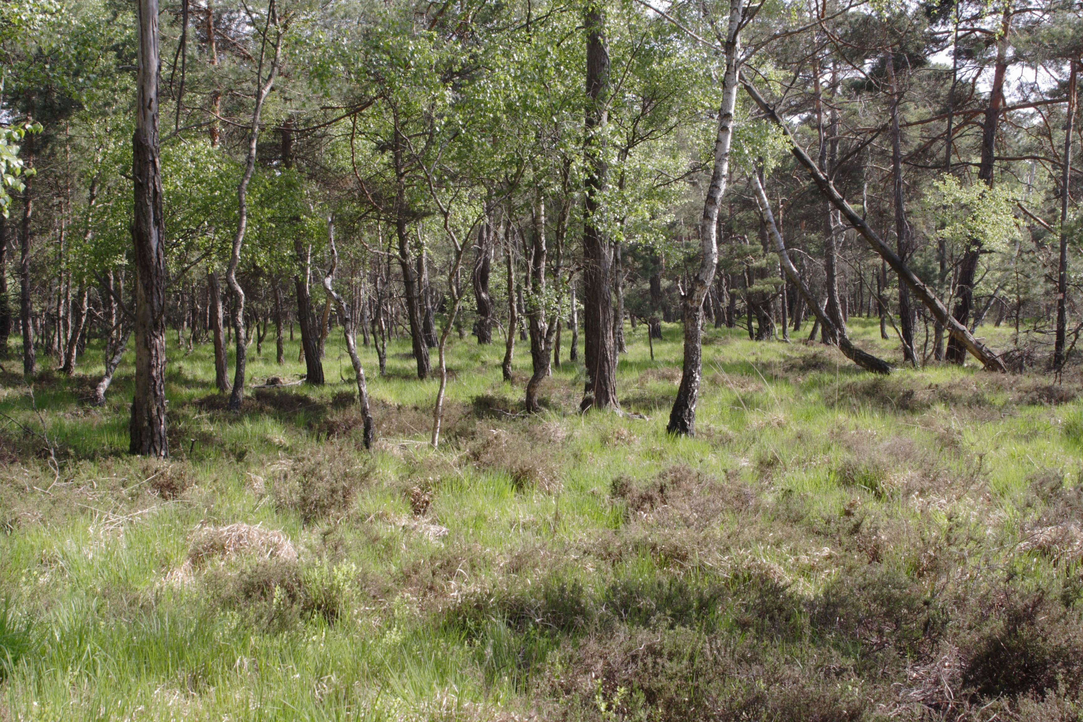 Dübener Heide - Mischwald - L 44